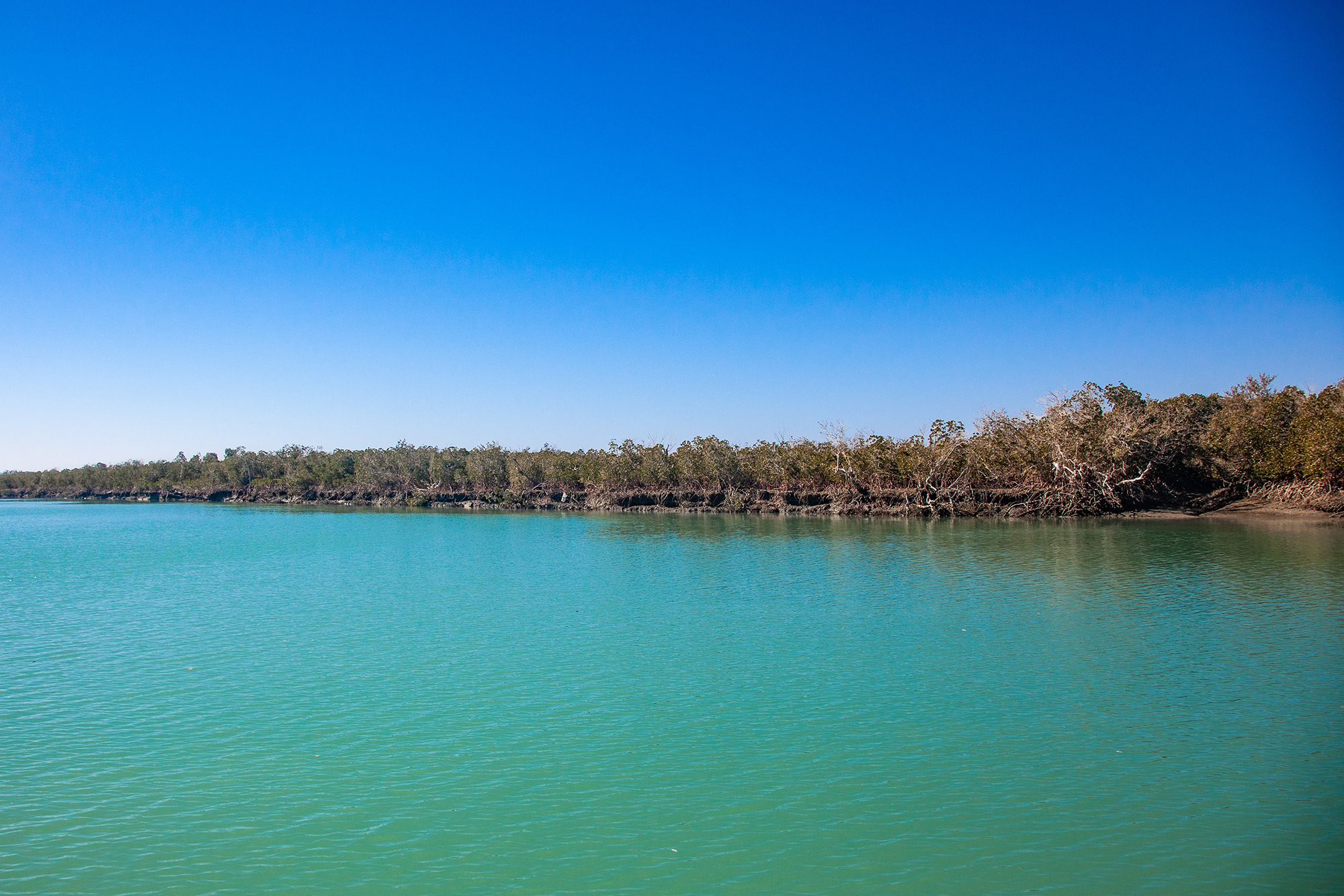 درختان حرا و چندل در تالاب (خور) آذینی